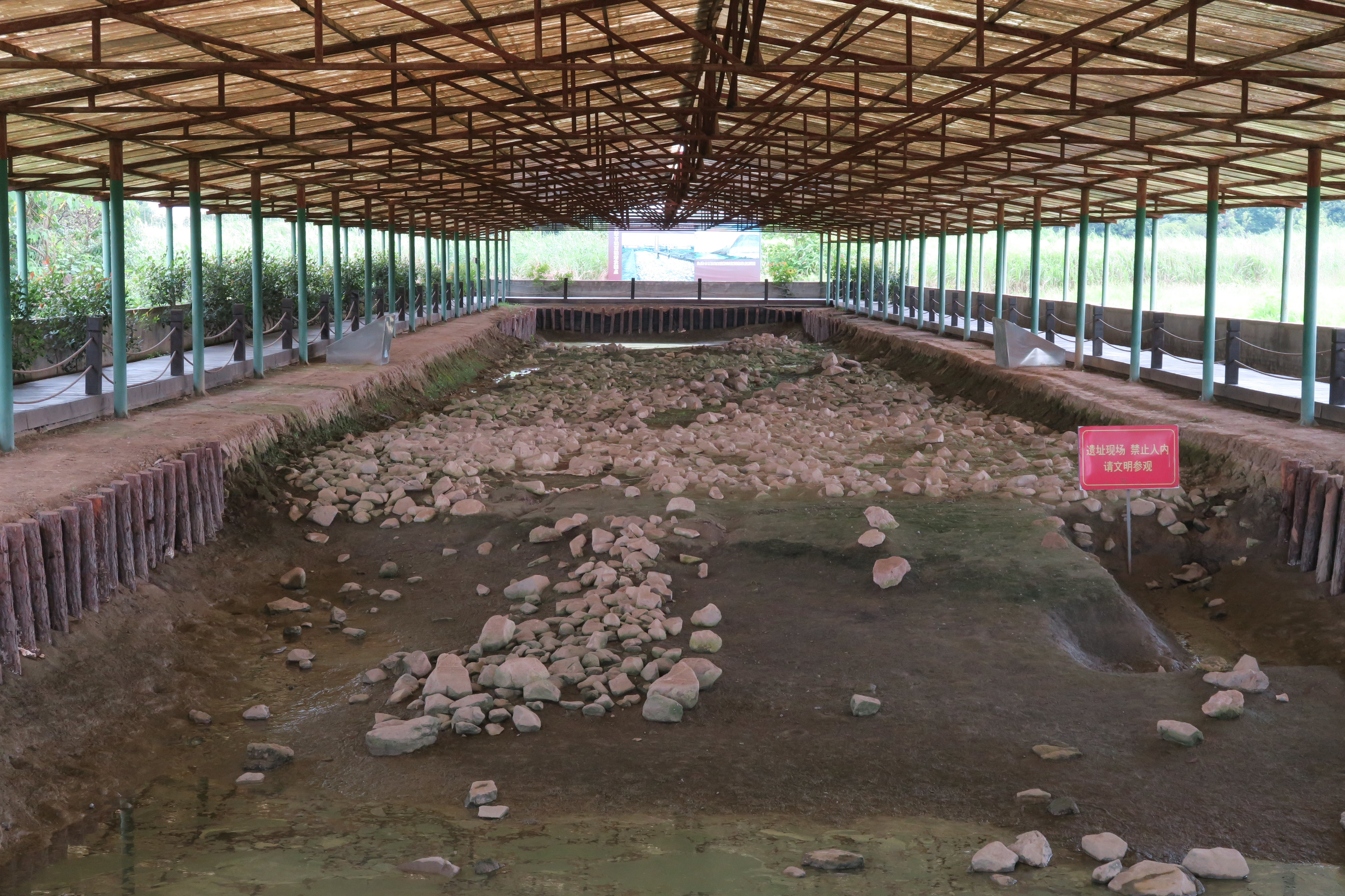 良渚古城西城墙展示区